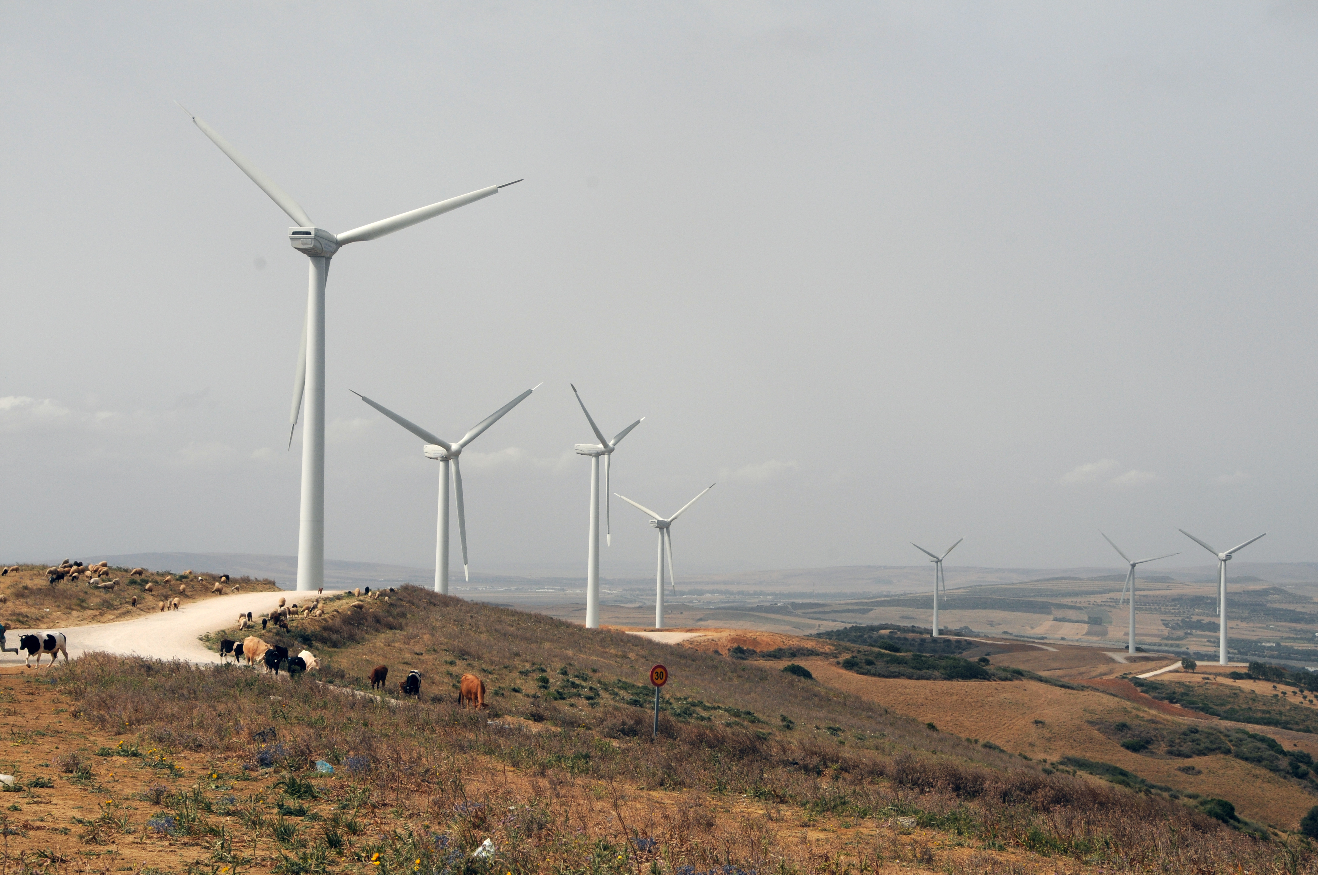 Parc d'éolienne sur les hauteurs du village d'El Alia au nord de la Tunisie.